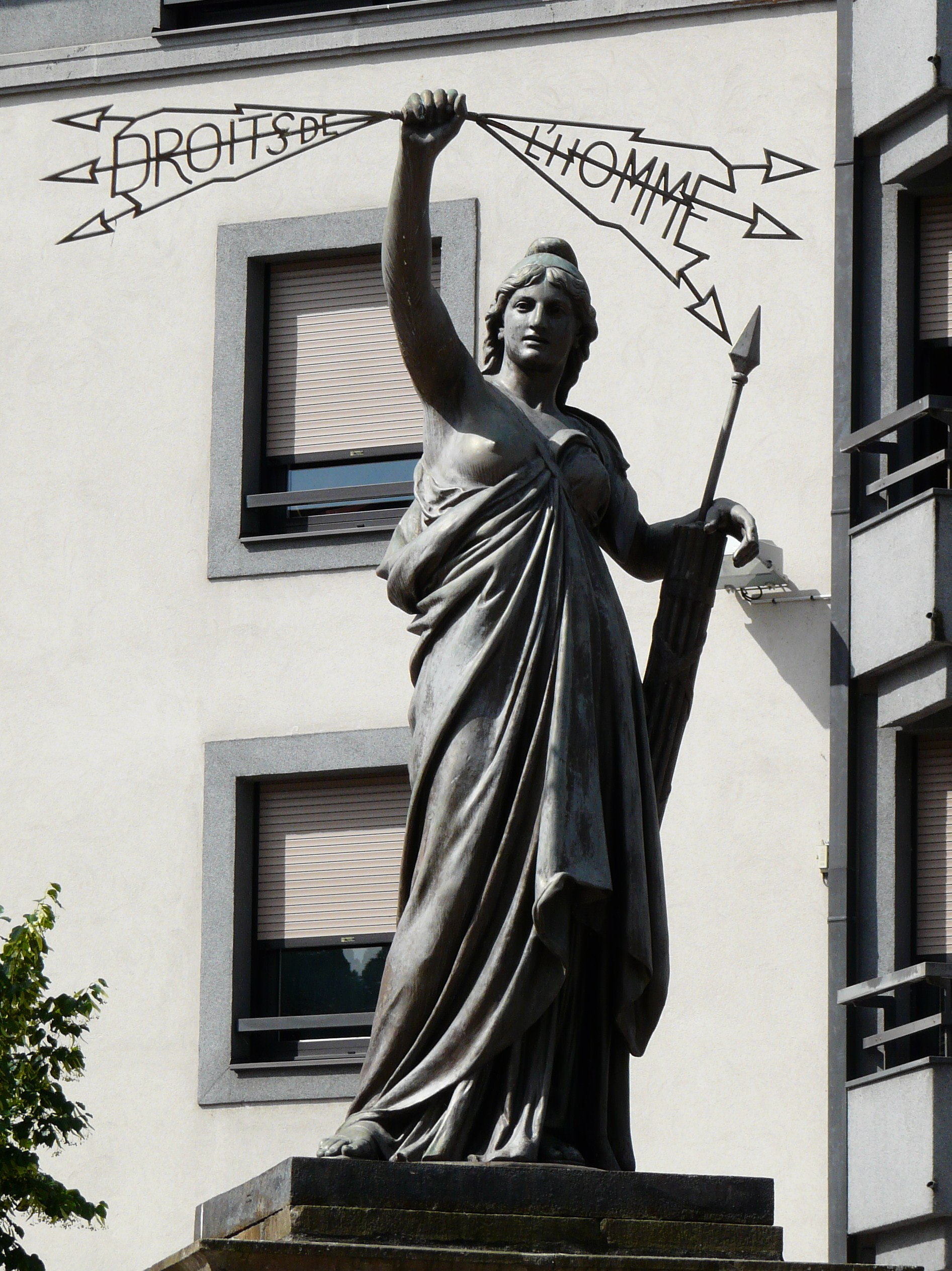 Datant de 1890, la statue des Droits de l'Homme de Charles-Romain Capellaro (1826–1899), Aurillac, Cantal, France.